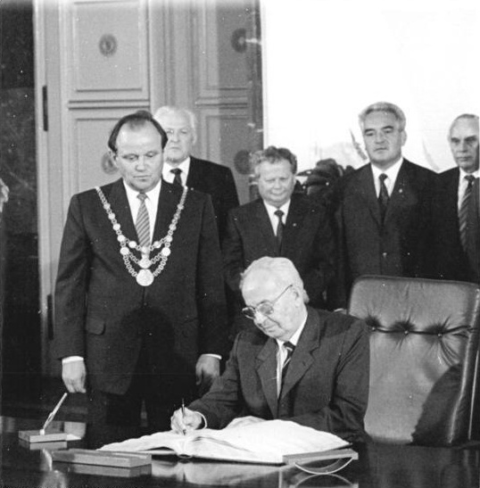 ADN-ZB Zimmermann 29.5.87 Berlin: Jubiläum - Rathaus. Der Generalsekretär des ZK der KPTsch und Präsident der CSSR, Gustav Husak, trug sich im Roten Rathaus in das Goldene Buch der Hauptstadt ein. L: Oberbürgermeister Erhard Krack. Information added by Wikimedia users.